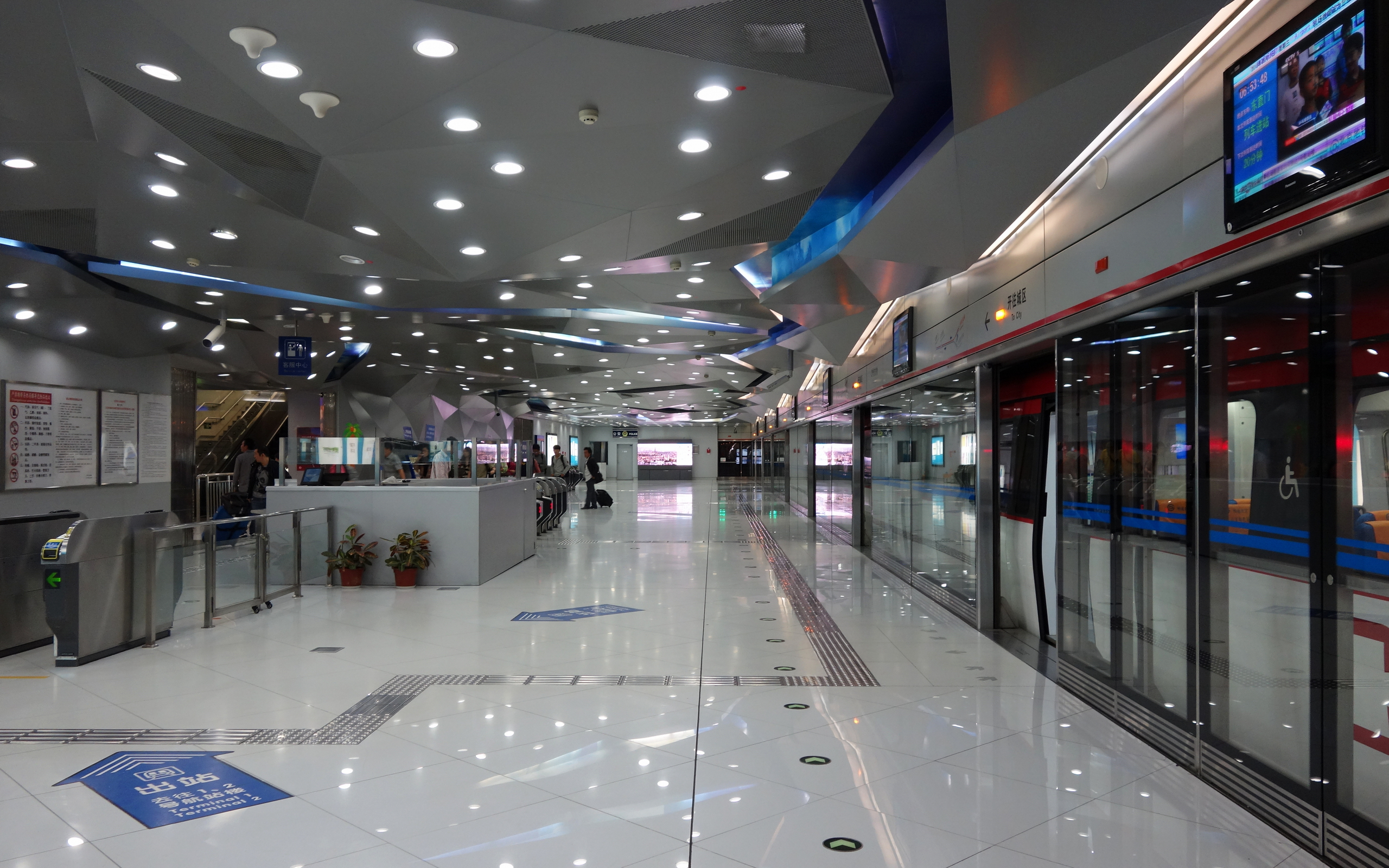 北京地铁机场线的首都机场2号航站楼车站站台.